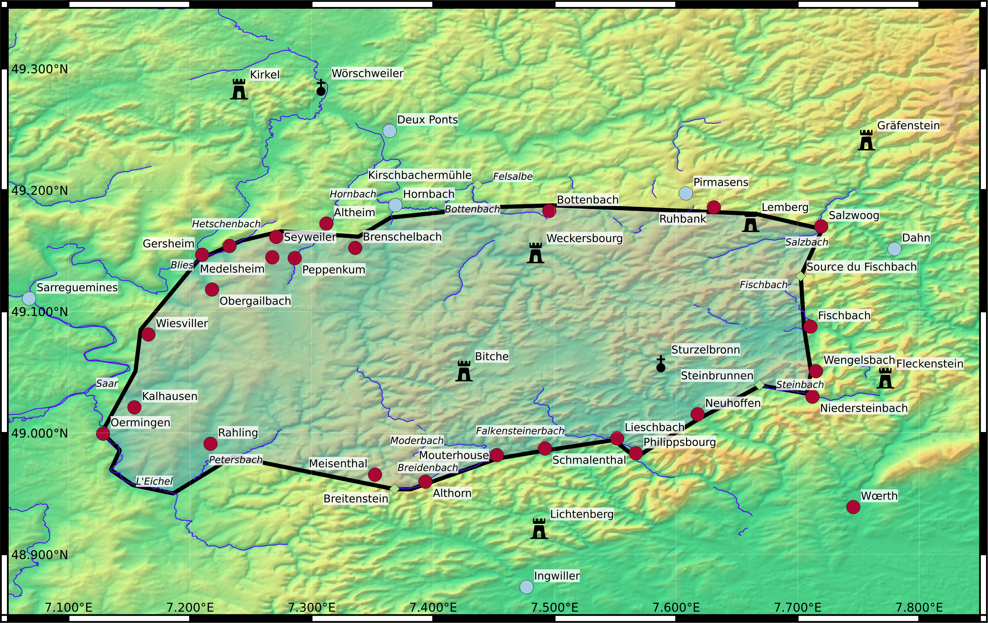 Karte der Herrschaft Bitsch Ende des 12. Jahrhunderts (Ortsnamen in Französisch)